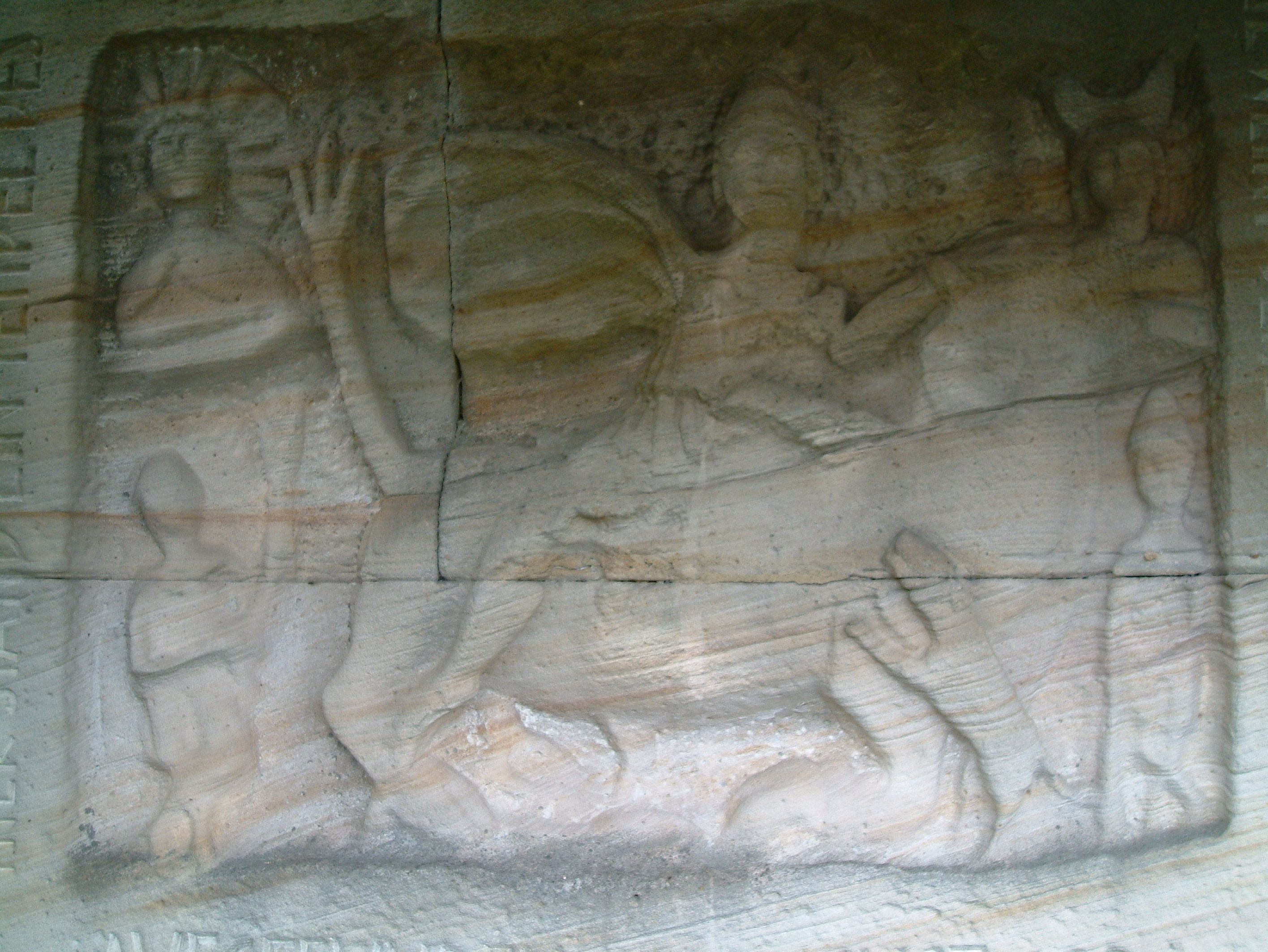 Mithras-Heiligtum in Gimmeldingen